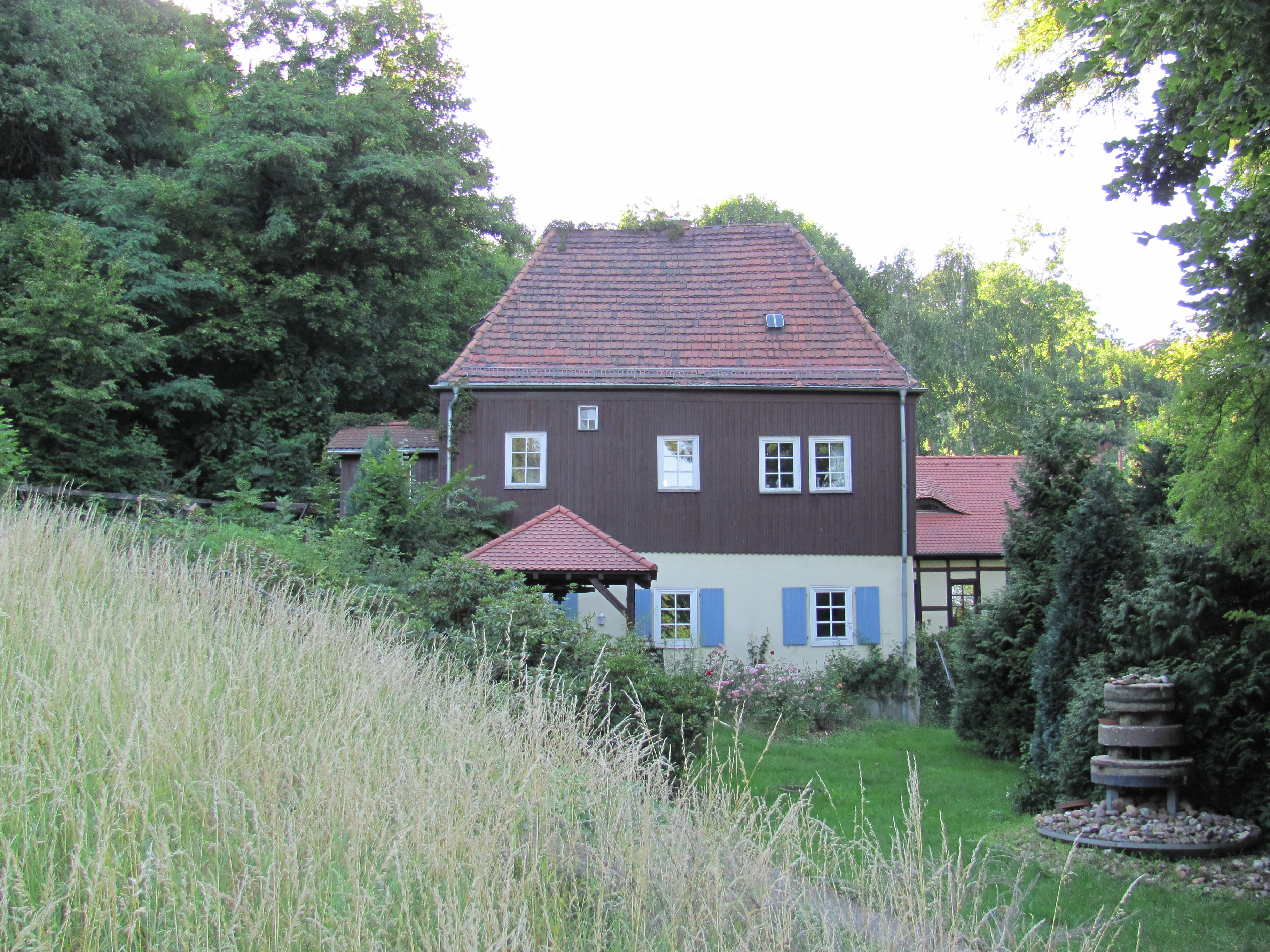 Auf den Bergen